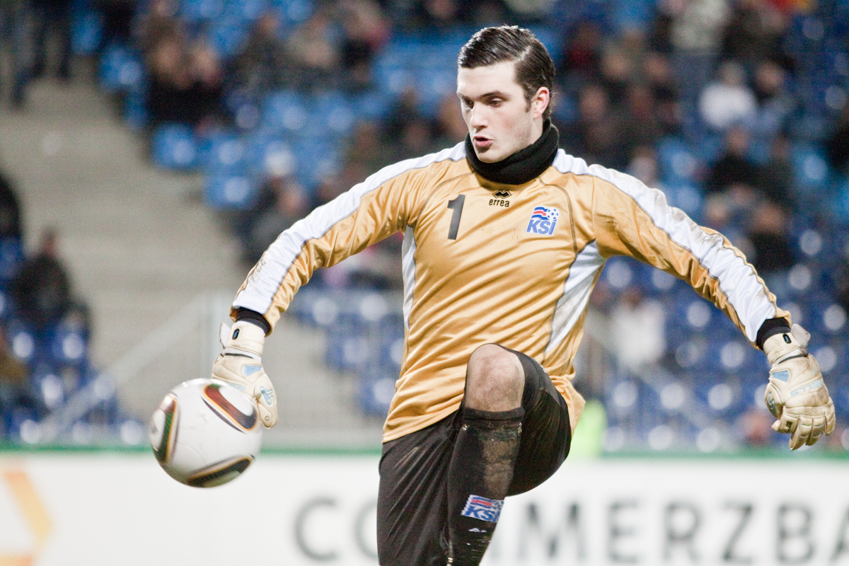 Haraldur Björnsson im U-21-Länderspiel gegen Deutschland.